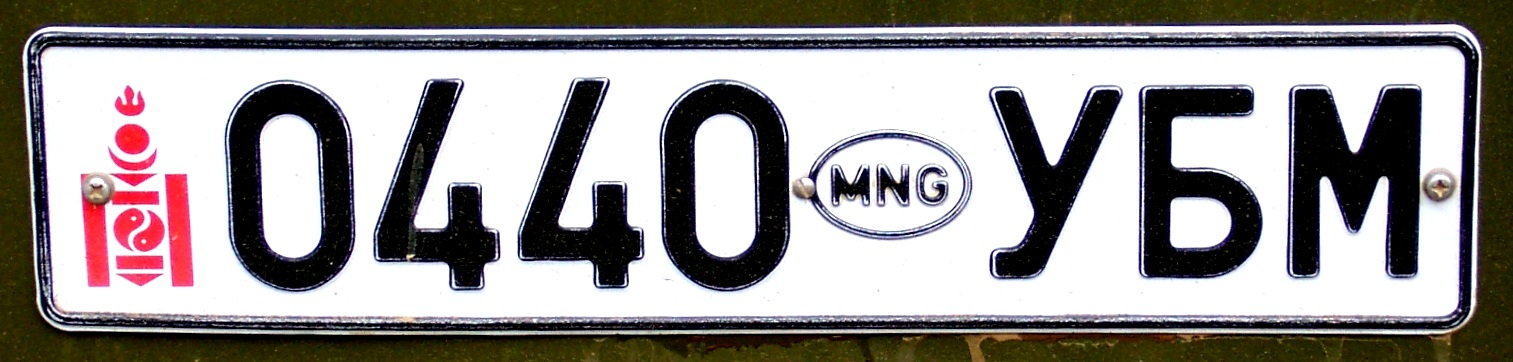 Plaque minéralogique mongole